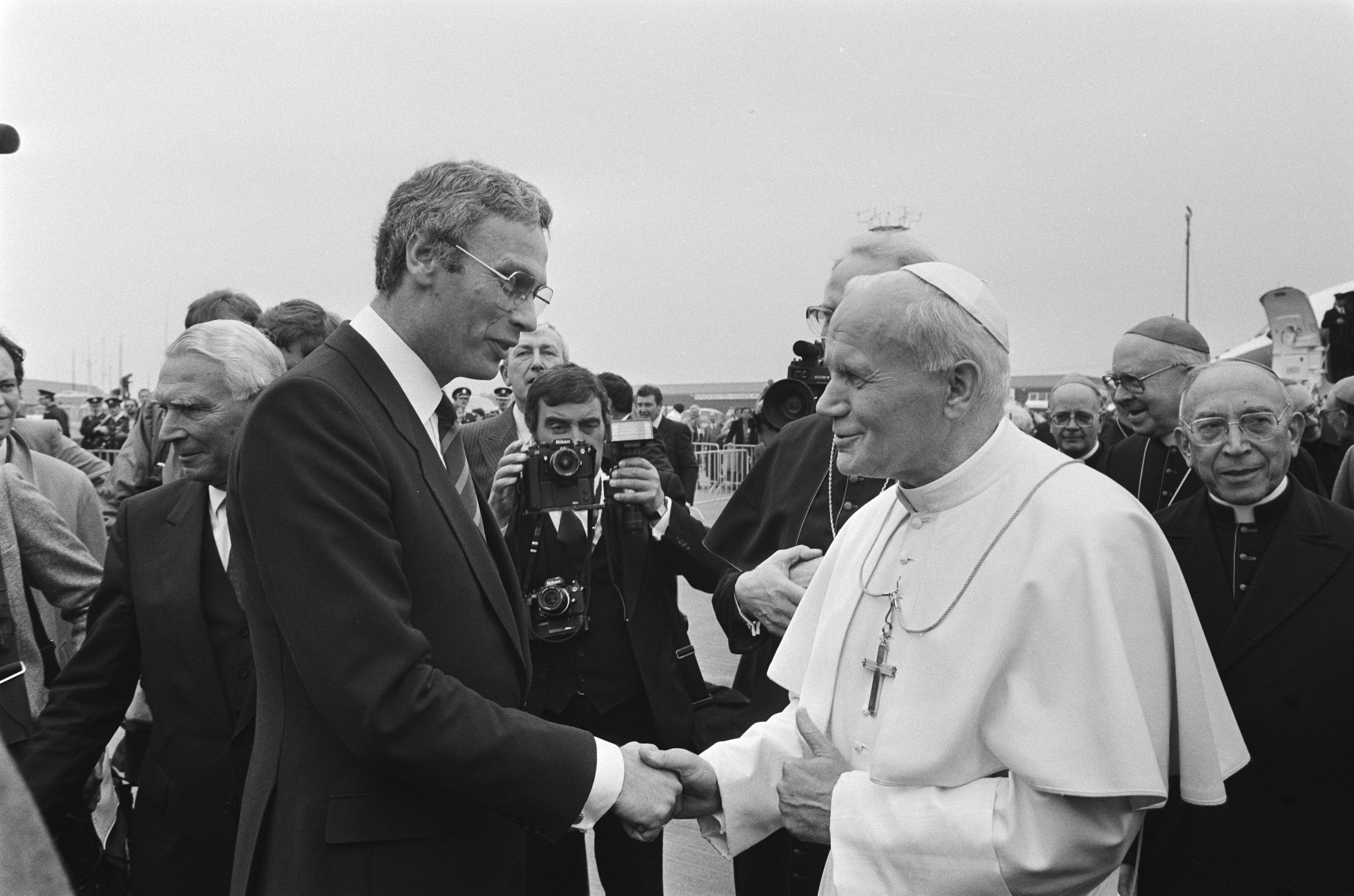 Collectie / Archief : Fotocollectie Anefo Reportage / Serie : [ onbekend ] Beschrijving : Bezoek Paus Johannes Paulus II aan Nederland; Paus begroet minister Van den Broek (Buitenlandse Zaken) Datum : 11 mei 1985 Trefwoorden : bezoeken, pausbezoeken, pausen Persoonsnaam : Broek, Hans van den, Johannes Paulus II (paus) Fotograaf : Croes, Rob C. / Anefo Auteursrechthebbende : Nationaal Archief Materiaalsoort : Negatief (zwart/wit) Nummer archiefinventaris : bekijk toegang 2.24.01.05 Bestanddeelnummer : 933-3252